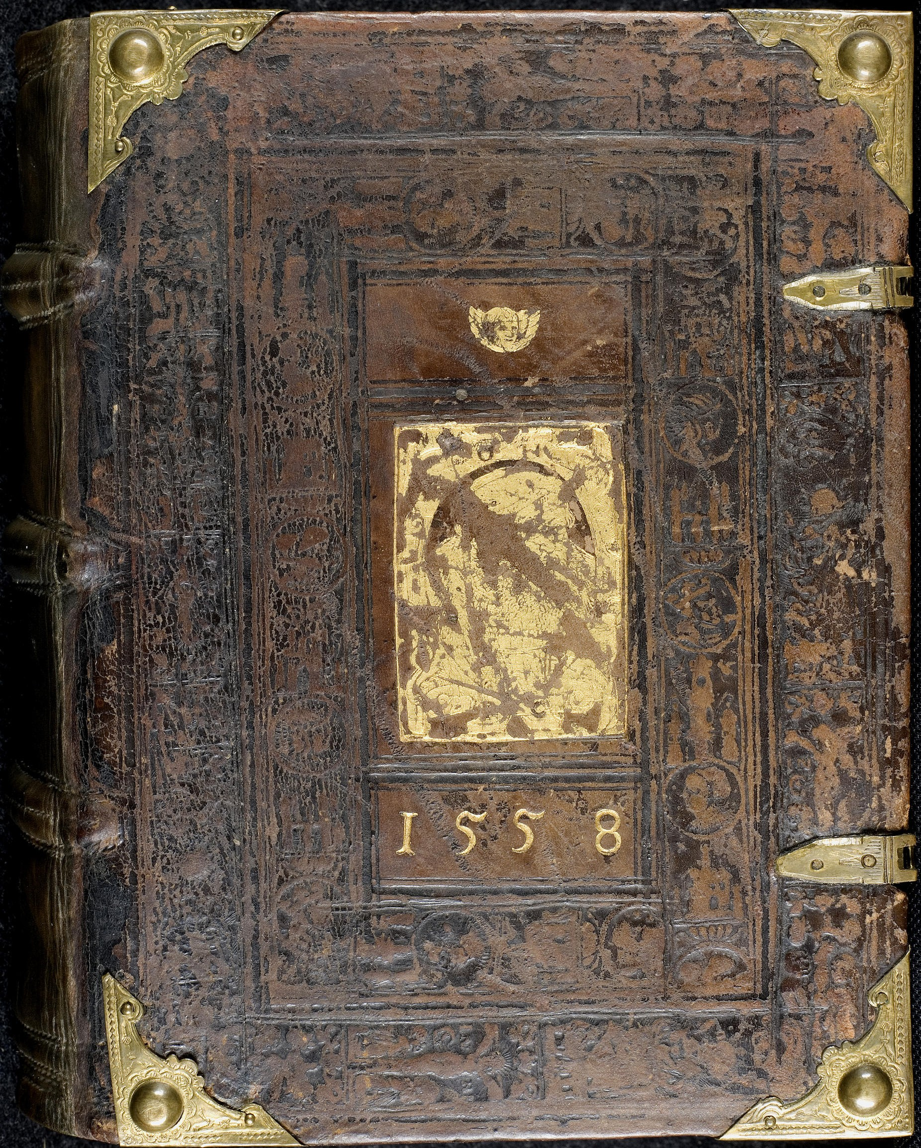 Codex Palatinus germanicus 13, Einband ("Ottheinrich-Einband"), Vorderdeckel: vergoldete Platte mit Bildnis Ottheinrichs, des Pfalzgrafen bei Rhein. Inschrift oben: O. H. (Ottheinrich); Inschrift unten: P. C. (Pfalzgraf, Churfürst); oberhalb: vergoldeter Engelskopf; unterhalb: Jahreszahl 1558